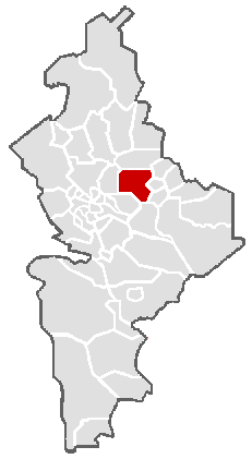 Ubicación geográfica del municipio de Cerralvo en el estado mexicano de Nuevo León.